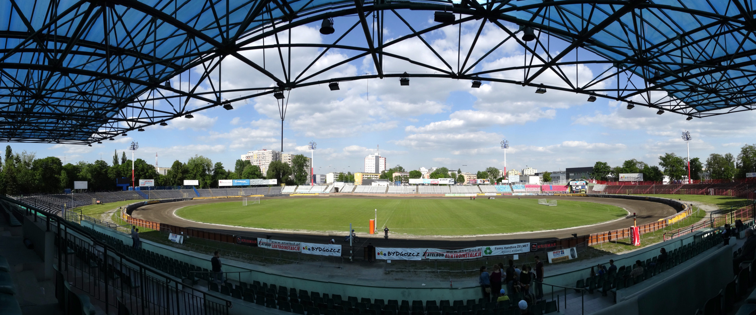 Stadion Polonii Bydgoszcz